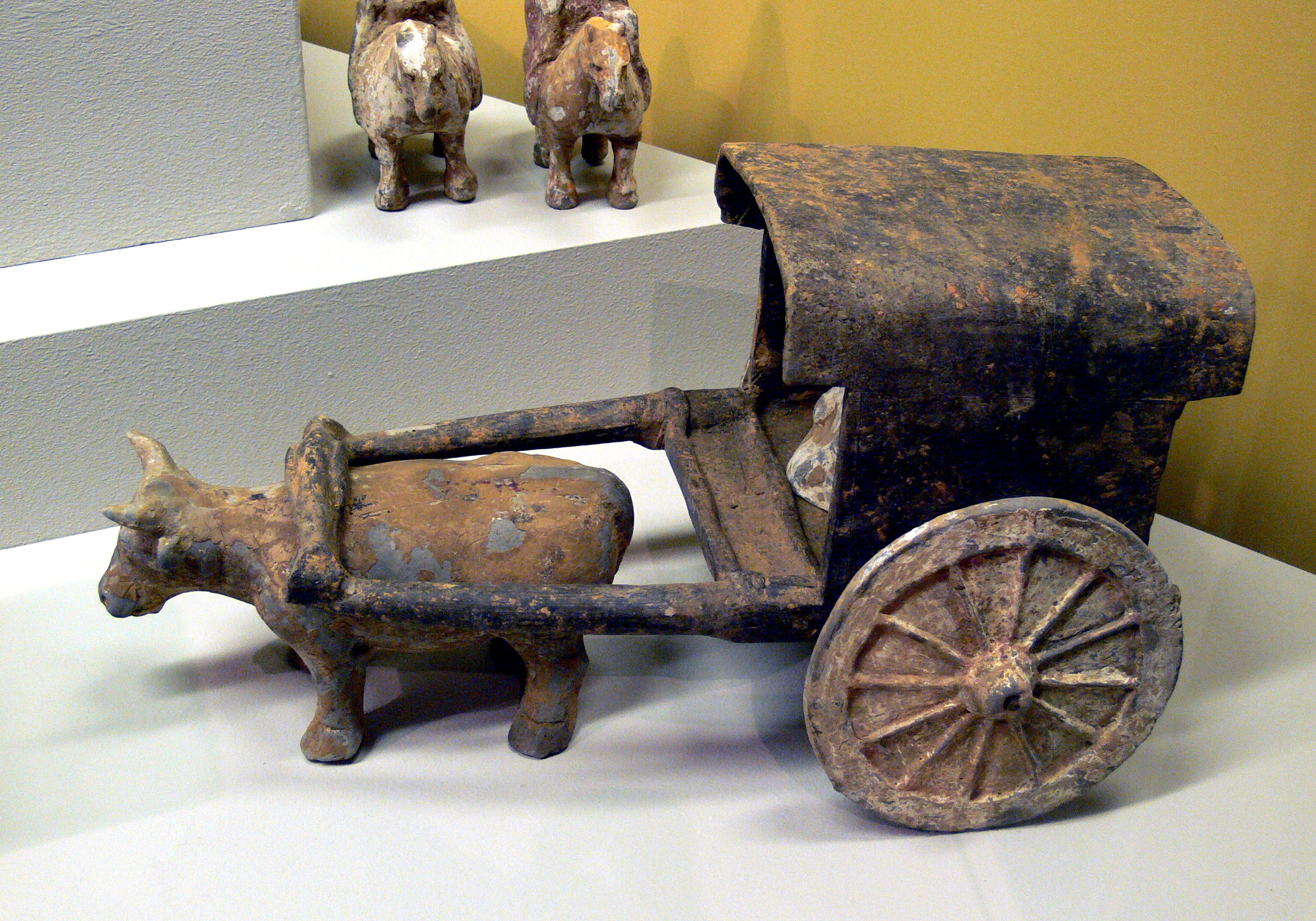 Modell eines Ochsenkarrens, graue Tonware mit Resten von Farbfassung; China, vermutlich Nord-Wei-Zeit, 5./6. Jh. Linden-Museum, Stuttgart, Inv. Nr. OA 24.357a–e L